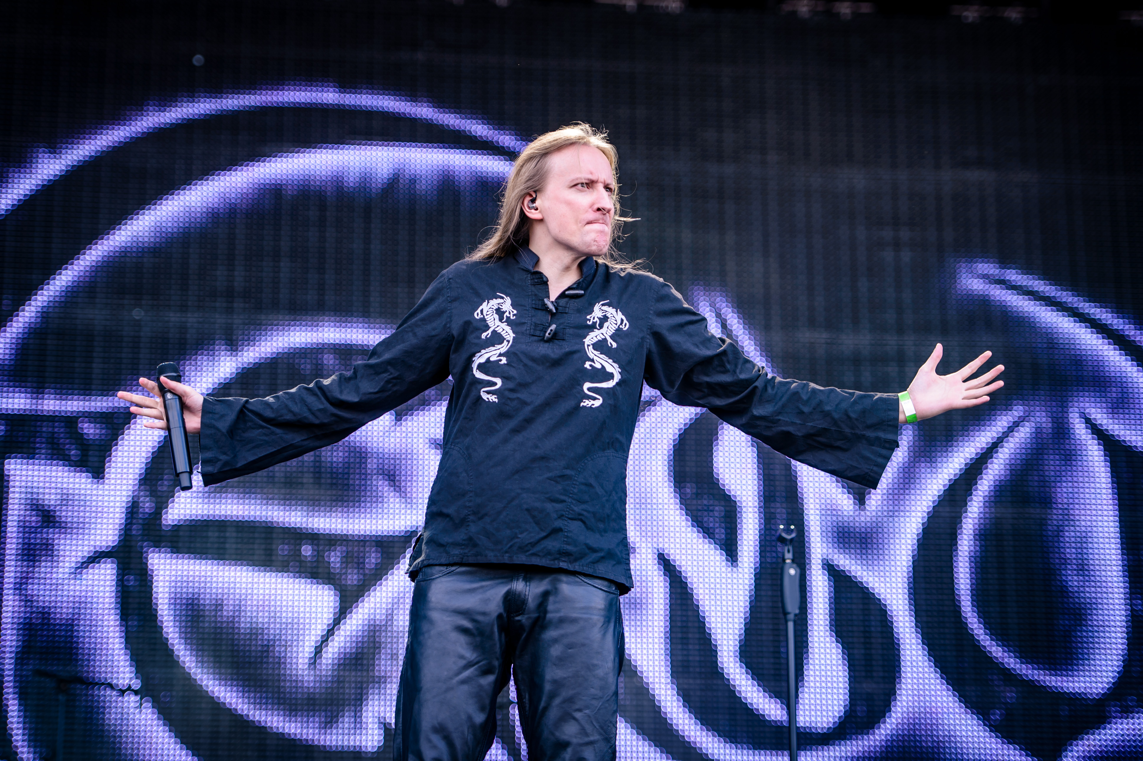 'Wacken Open Air 2018': 'Wintersun'